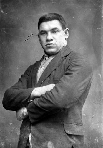 Paulino Uzkudun Eizmendi (1899-1985) boxeolari errezildarra.